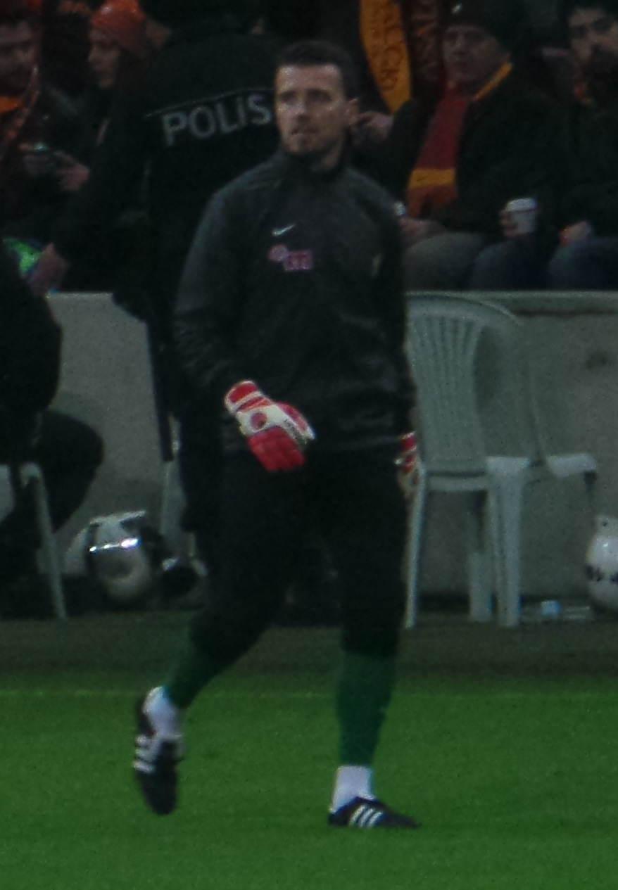 Sinan Ören